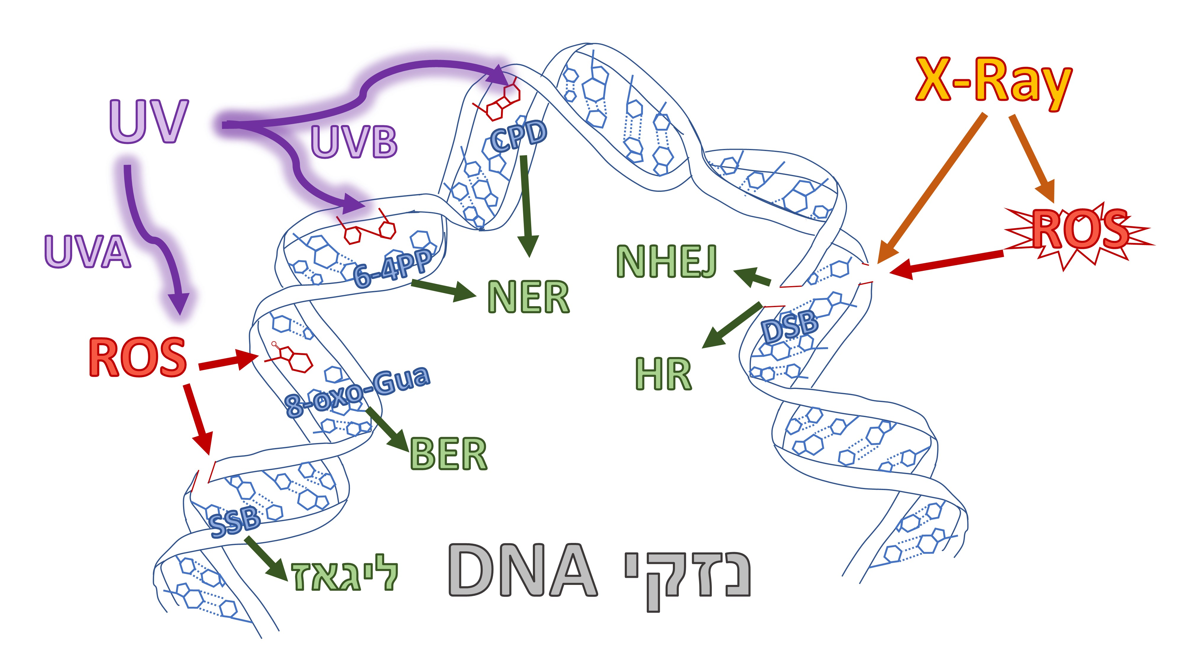 תיקון נזקי DNA מקרינת UV וקרינת X-ray ומנגנוני תיקון